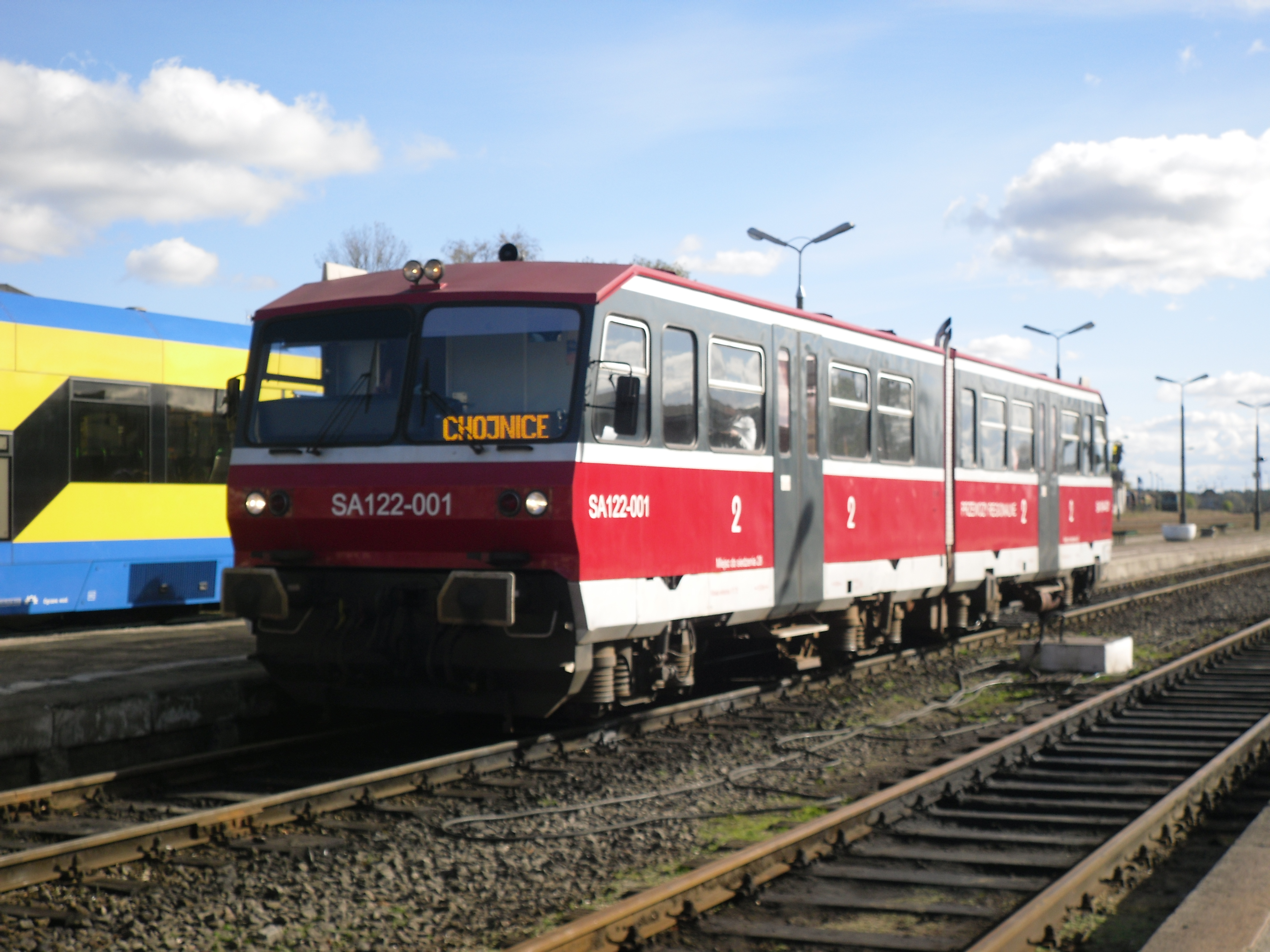 SA104-SA122 w Kościerzynie